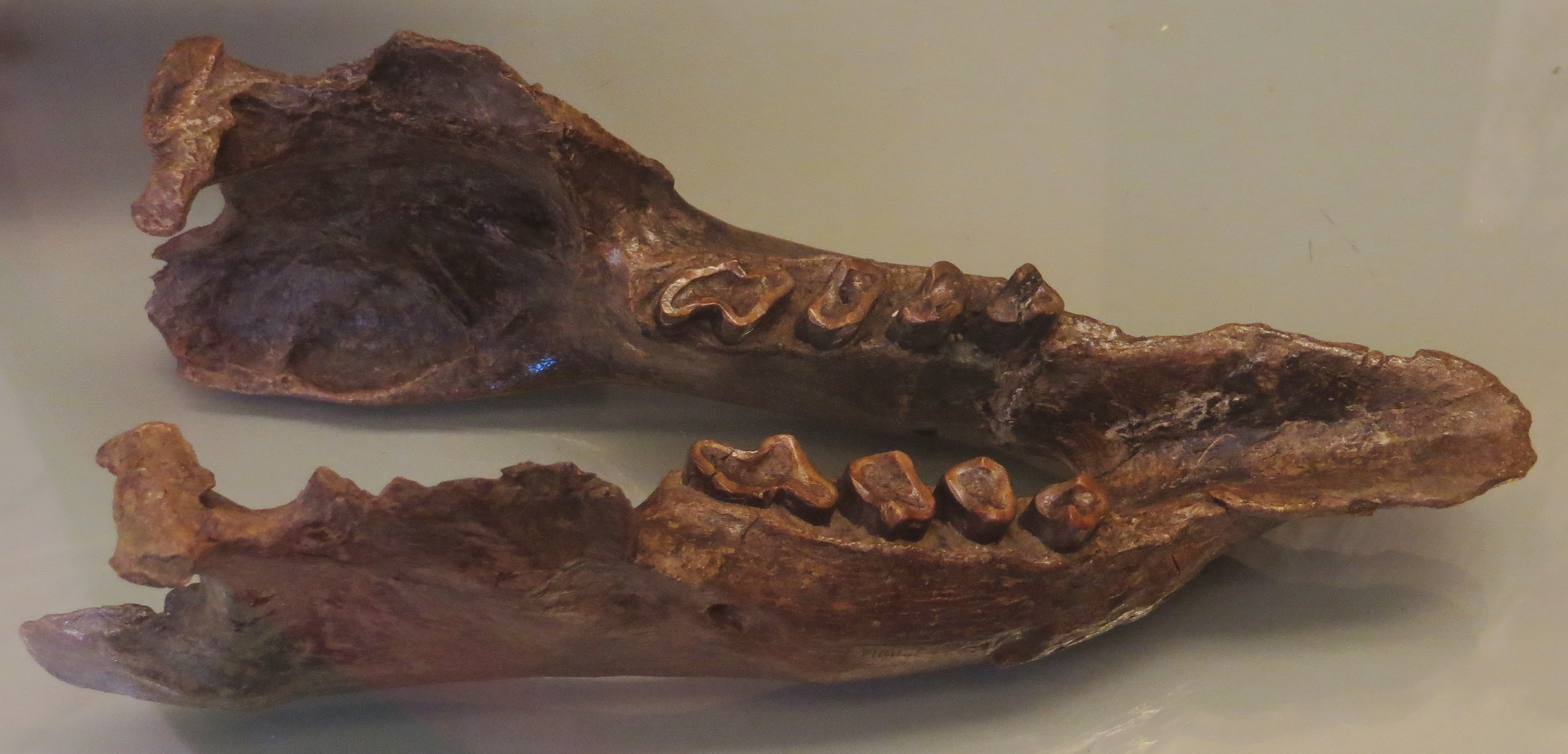 Fossil Mandible of Nematherium